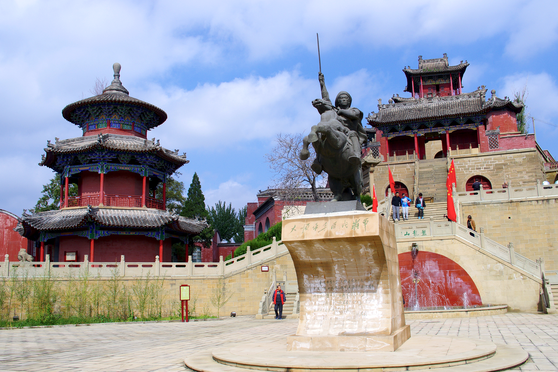 中文（中国大陆）: 位于米脂县北的盘龙山上，盘龙山原名马鞍山，是省级重点文物保护单位。